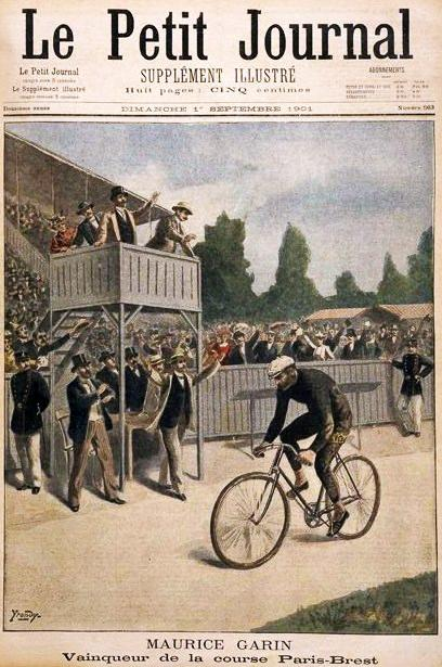 Maurice Garin, vainqueur de la course Paris-Brest en 1901 (Le Petit Journal du 1er septembre 1901)